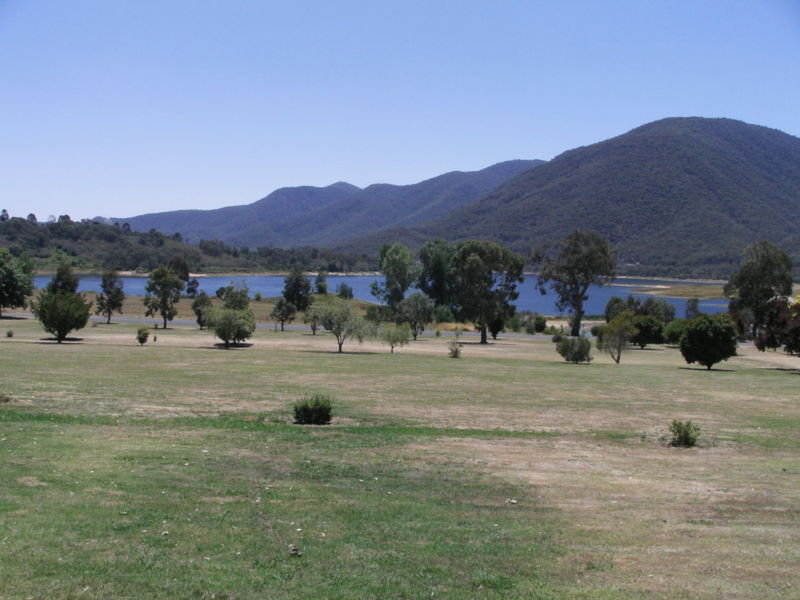 Talbingo - Jounama Pond